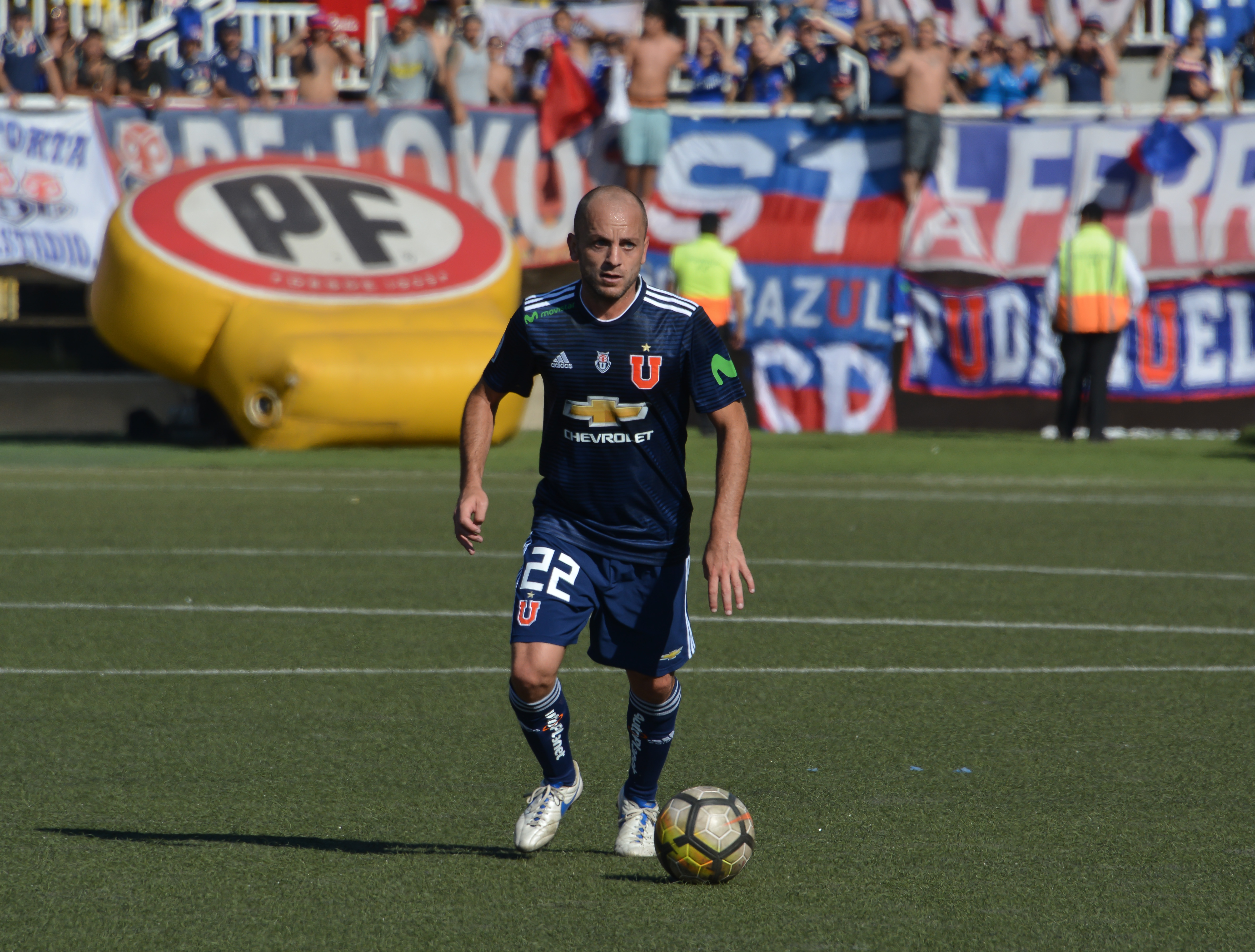 Unión La Calera v Universidad de Chile, Estadio Municipal Lucio Fariña Fernández, Quillota, Chile.